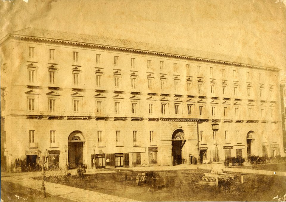 Largo del Castello (attuale Piazza Municipio) con il palazzo dei Ministeri (Palazzo Sa Giacomo) e l'orologio elettrico di città (1855).